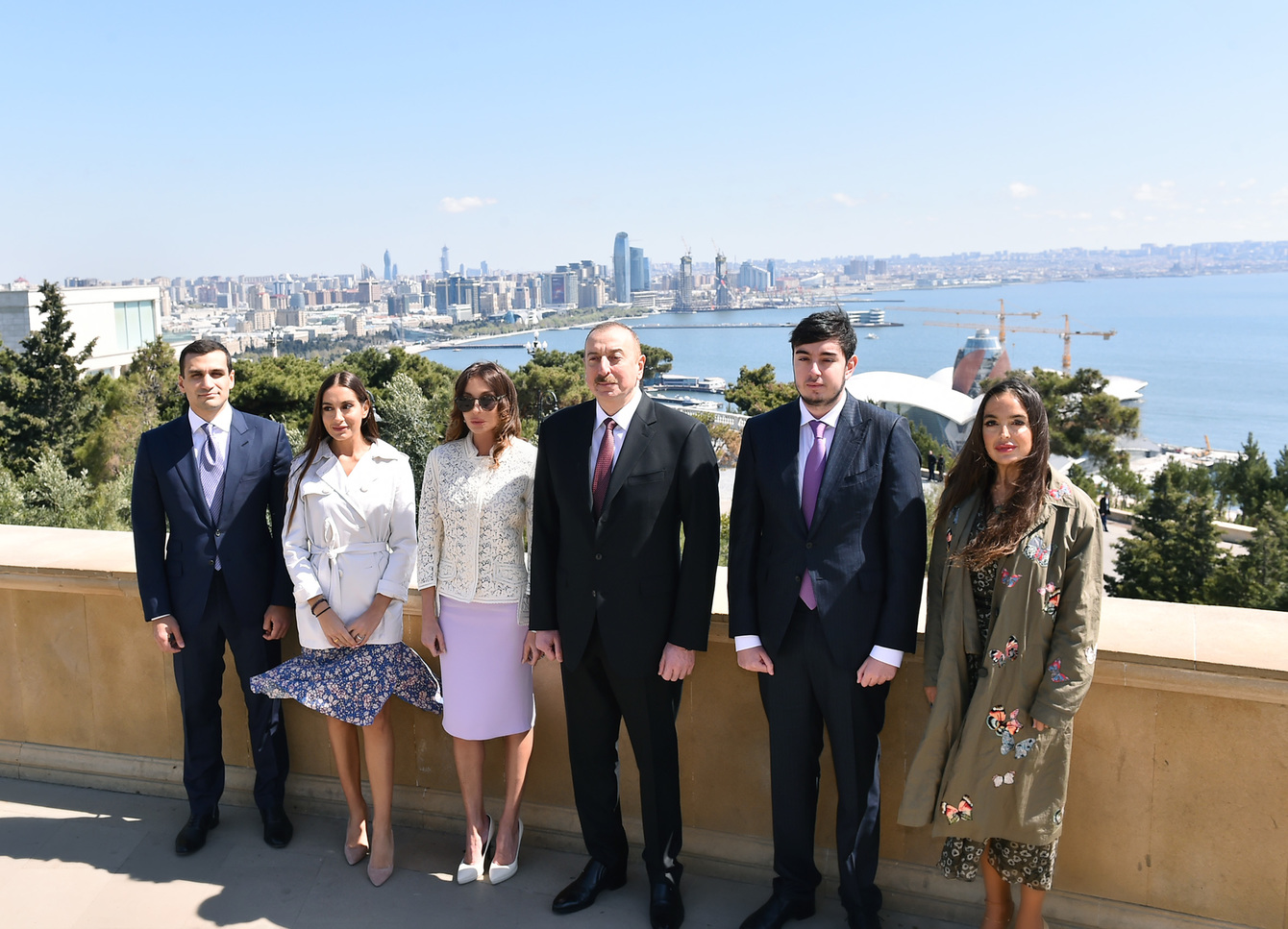 Ilham Aliyev paid tribute to Azerbaijani martyrs